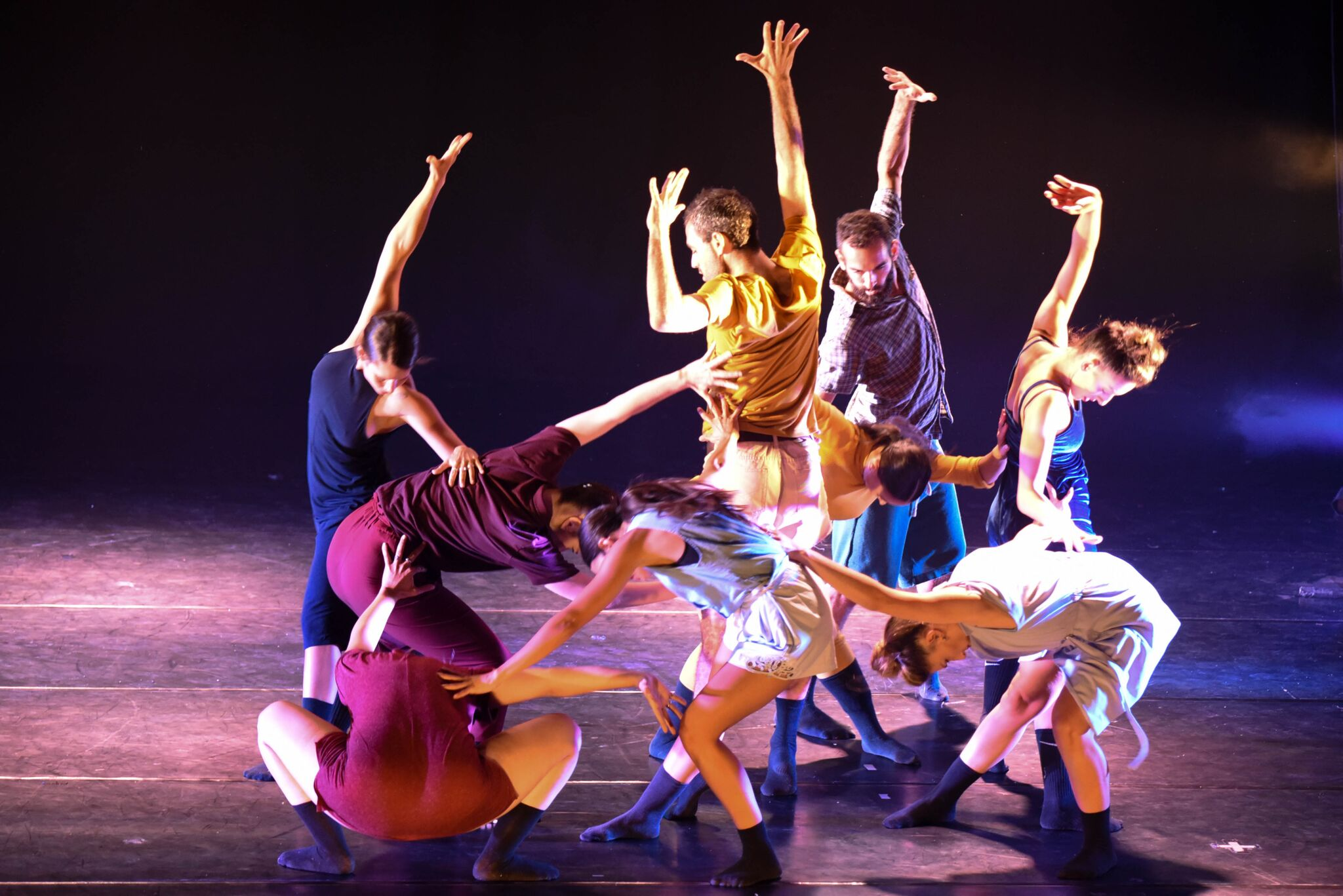 תמונות איתך